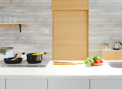 株式会社OCEAN'S 内のキッチンステージ